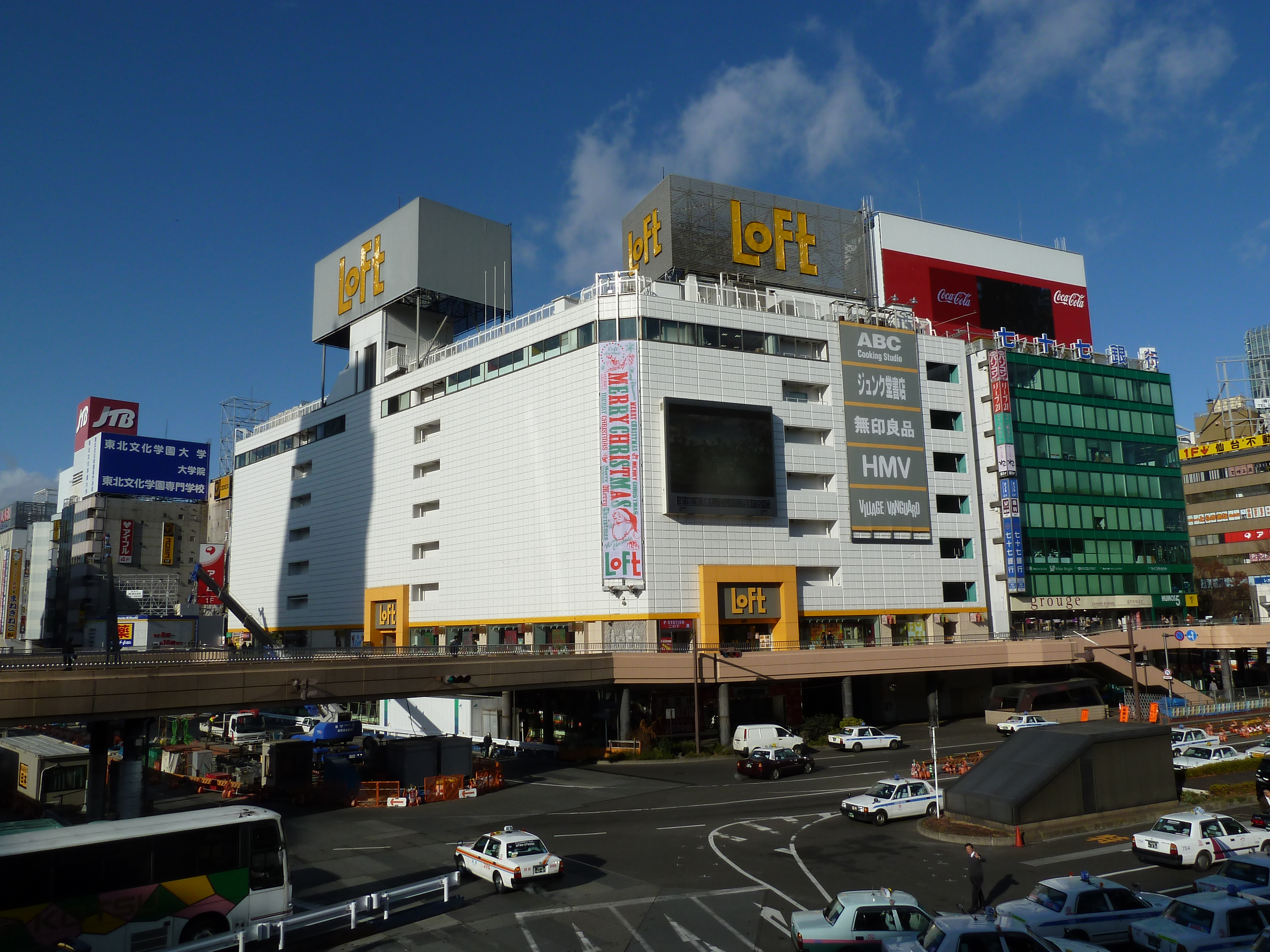 仙台ロフト